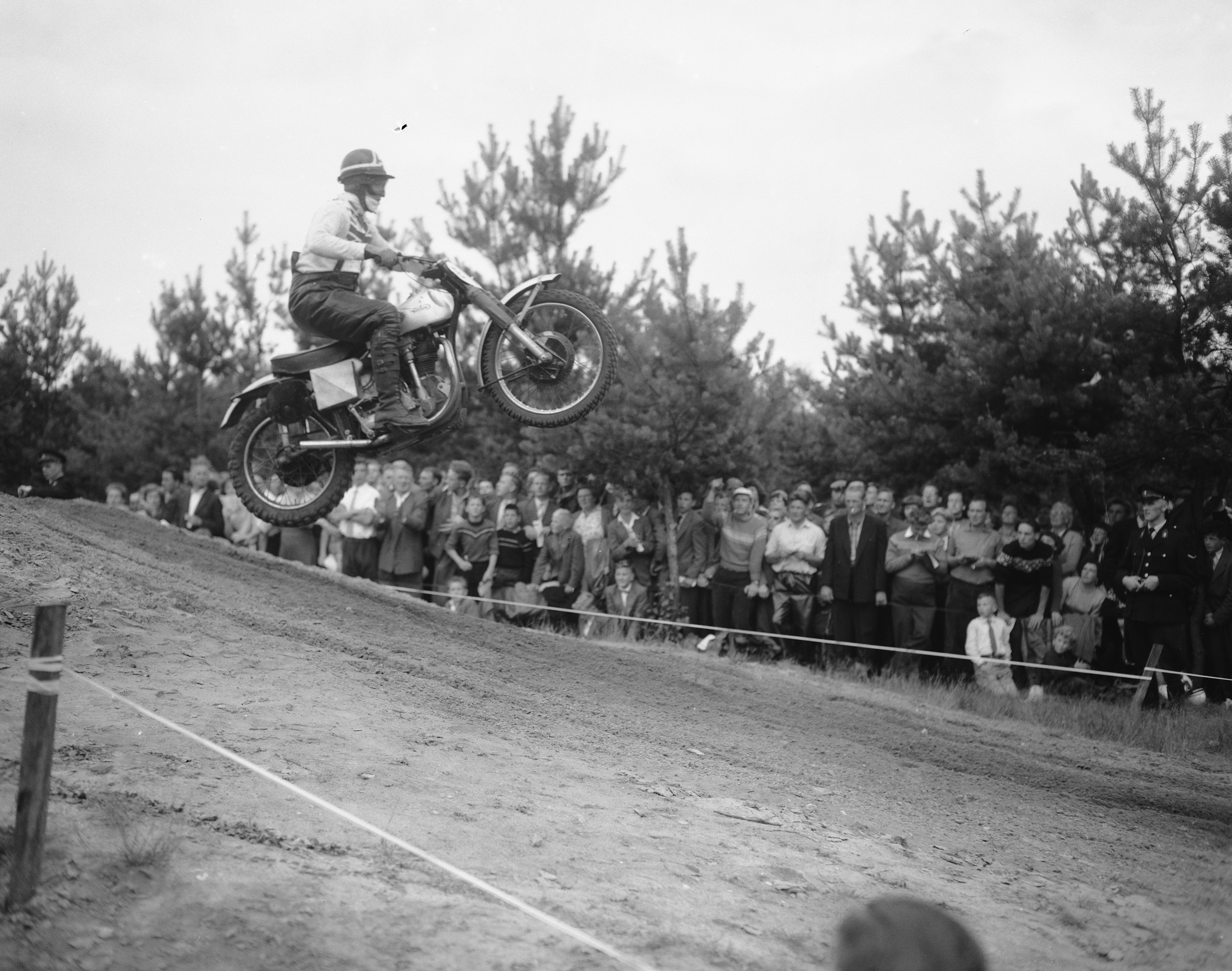 Collectie / Archief : Fotocollectie Anefo Reportage / Serie : [ onbekend ] Beschrijving : Grote prijs van Nederland motorcross te Lichtenvoorde Datum : 28 juli 1957 Locatie : Lichtenvoorde, Nederland Trefwoorden : MOTORCROSSEN Fotograaf : Bilsen, Joop van / Anefo Auteursrechthebbende : Nationaal Archief Materiaalsoort : Negatief (zwart/wit) Nummer archiefinventaris : bekijk toegang 2.24.01.04 Bestanddeelnummer : 908-8143